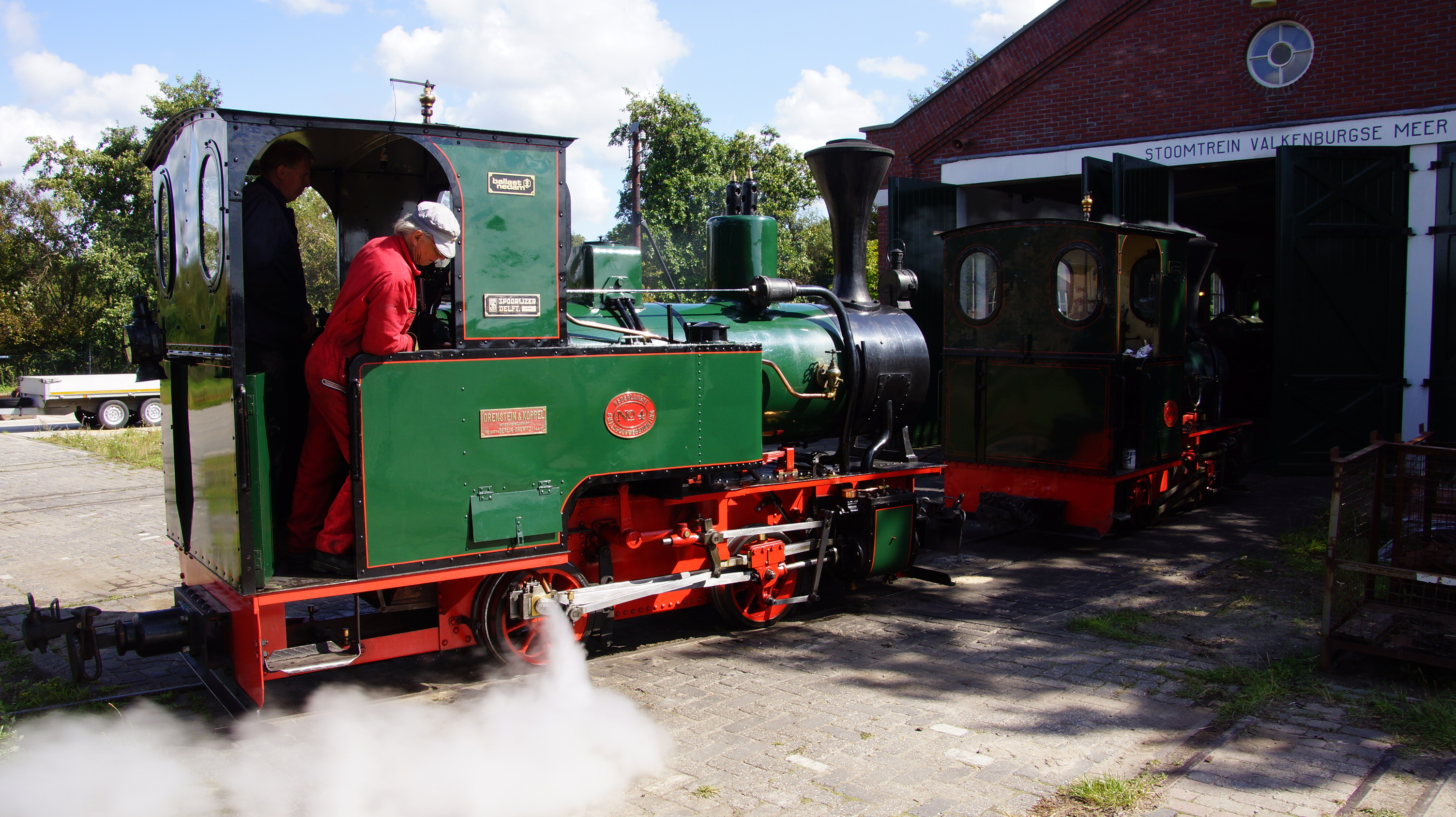 Stoomtrein Valkenburgse Meer - Stoomlok 4 - K A Neve Orenstein & Koppel, Fabrieksnummer 12974, Bowjaar 1937, Vermogen 50Pk